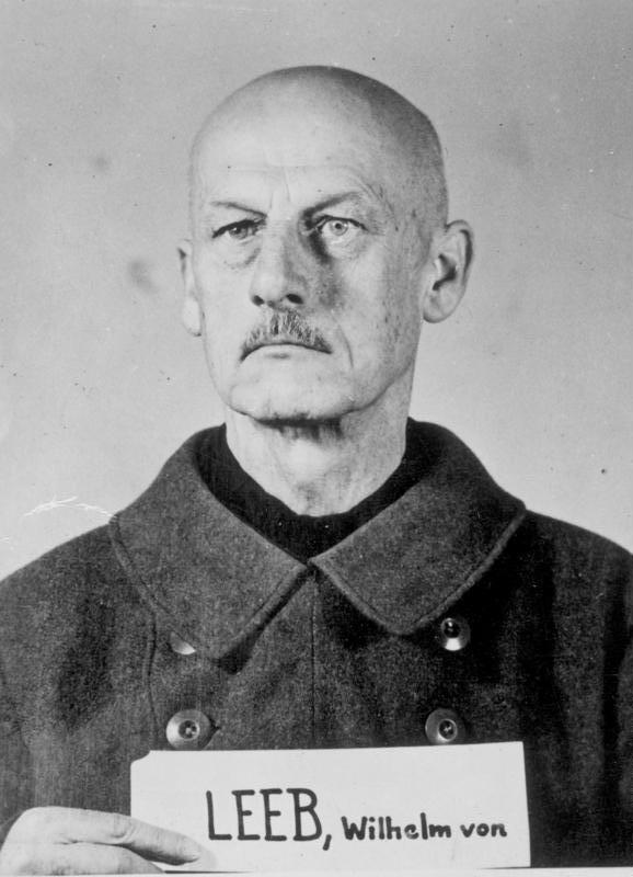 Generaloberst Wilhelm von Ritter Leeb als Angeklagter in Nürnberg, Jan. 1948 dpd-Illus